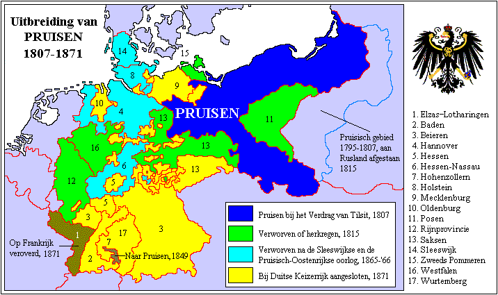 Uitbreiding Pruisisch grondgebied 1807-1871